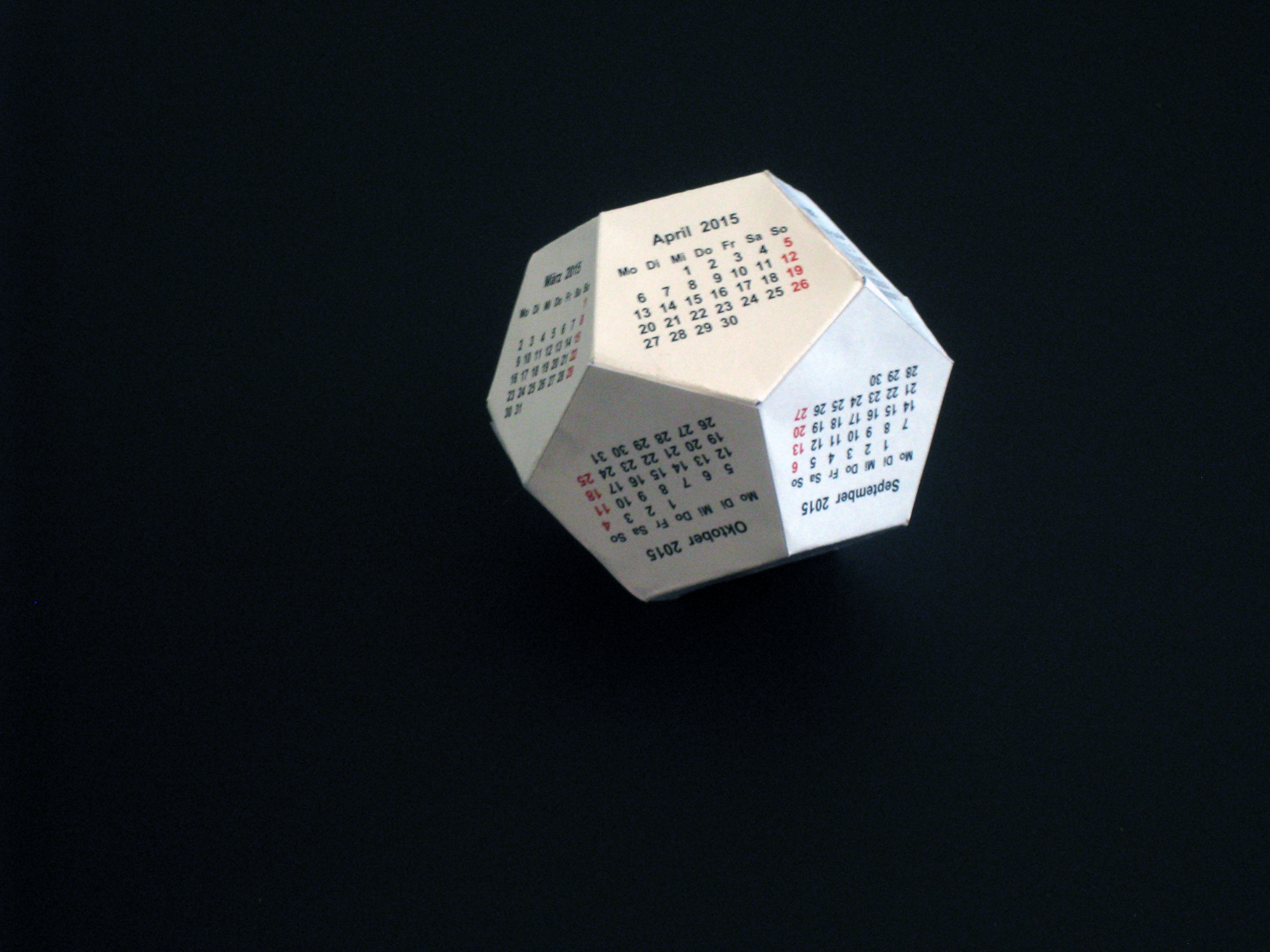 Dodekaeder Kalender